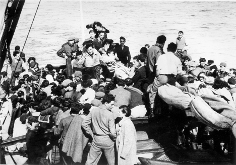 לוי שוורץ מדבר אל מעפילים באונית המעפילים אטרטו (ראו: ב"צ דינור (עורך), ספר תולדות ההגנה, ב, ב, עמ' 1056 [בעמודי הצילומים])